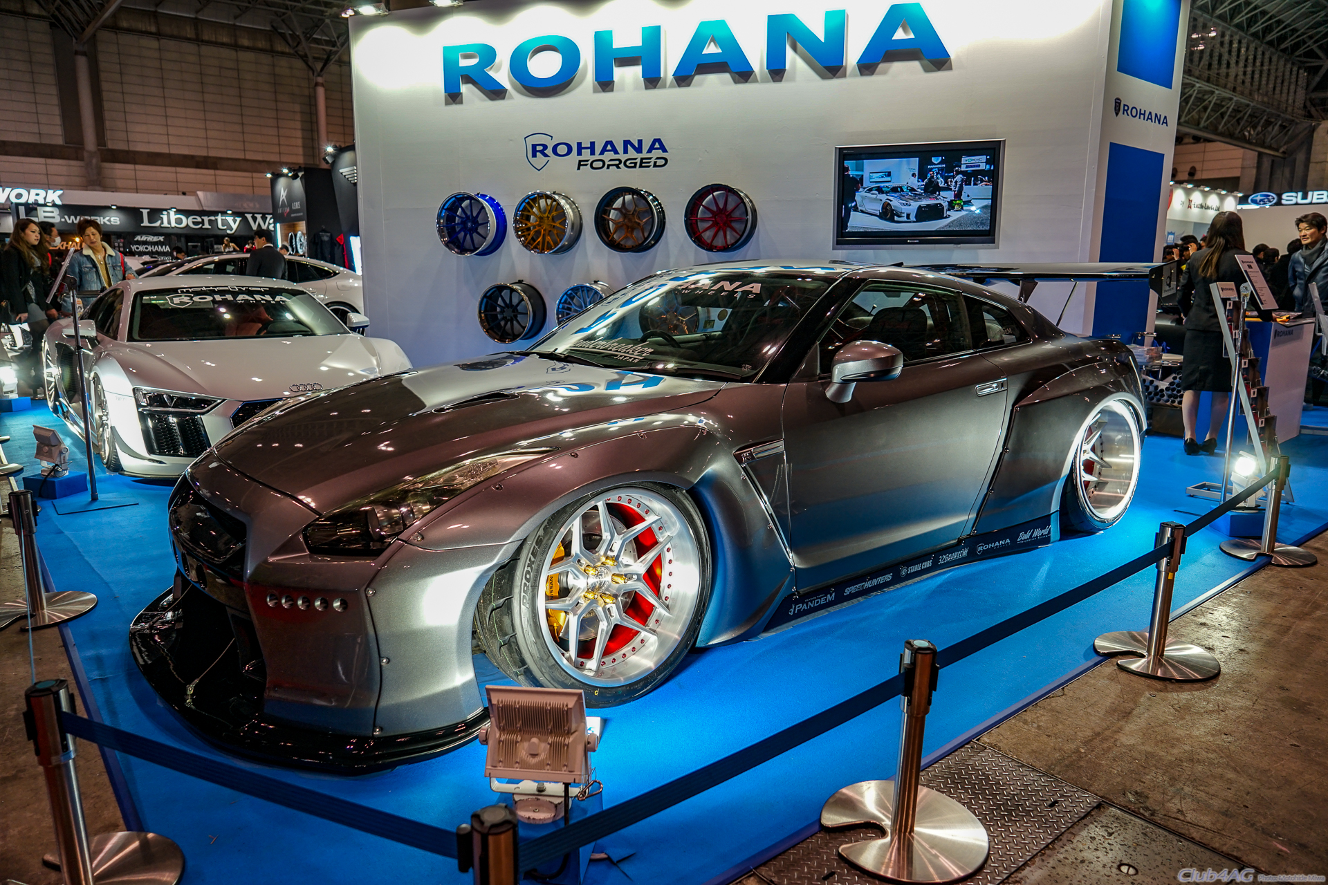 Tokyo Auto Salon 2019